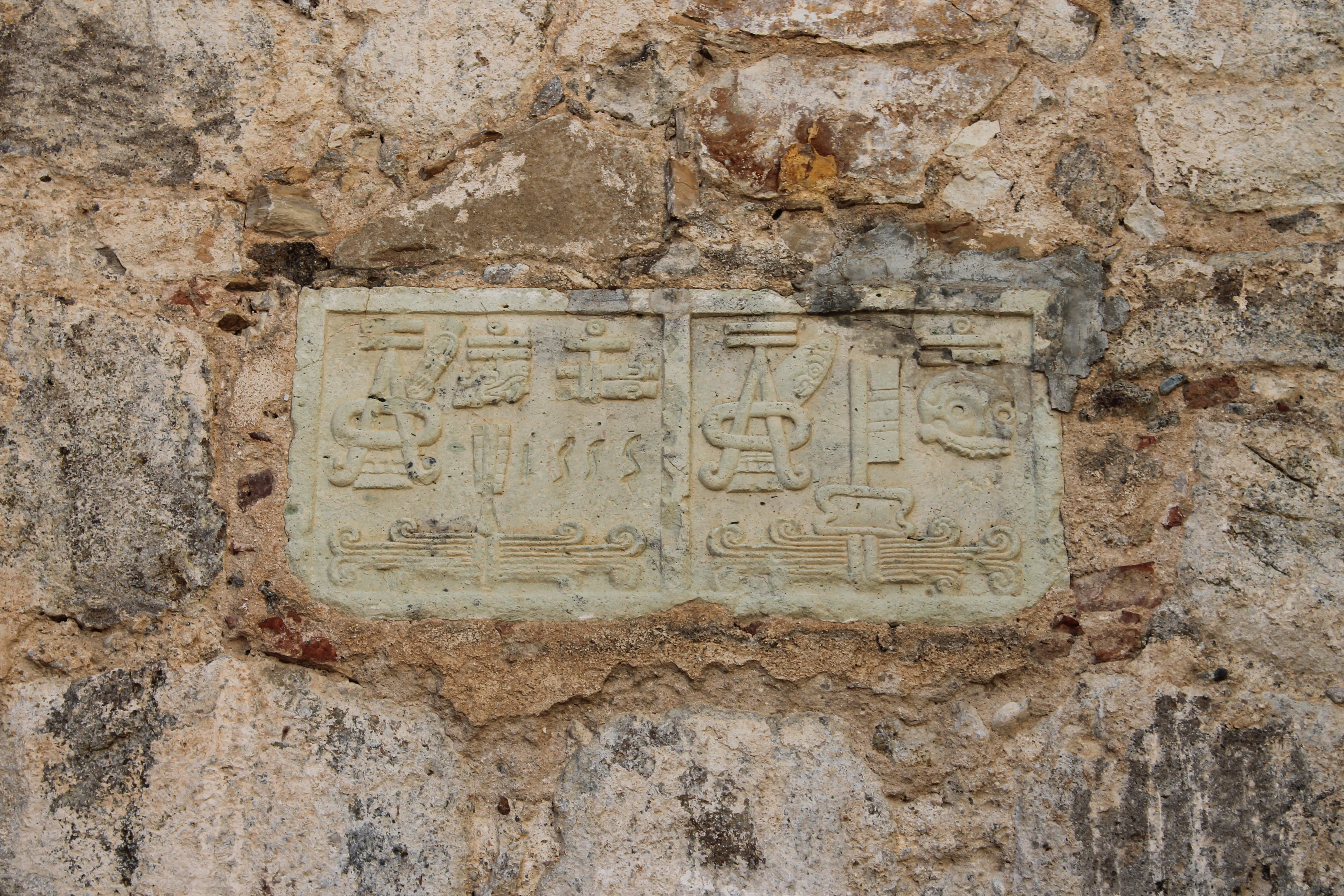 En la imagen se aprecia un detalle tequitqui en uno de los muros del Ex Convento de Santiago Apostol. El recuadro muestra una inscripción conmemorativa de la fecha en la que se comenzó a construir el convento, 1555.